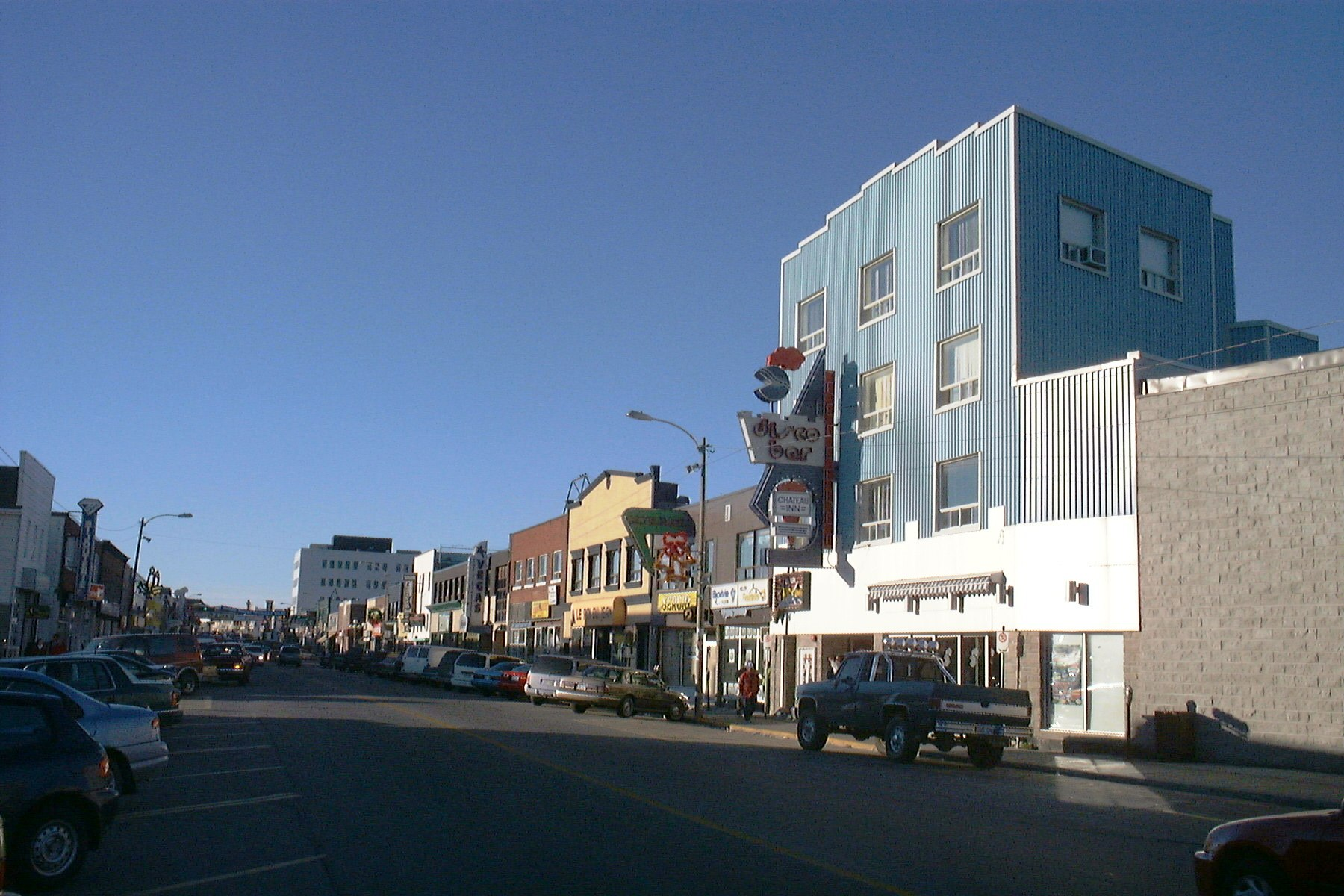 Rue principale (3eme Avenue) Val-d'Or, Québec, Canada